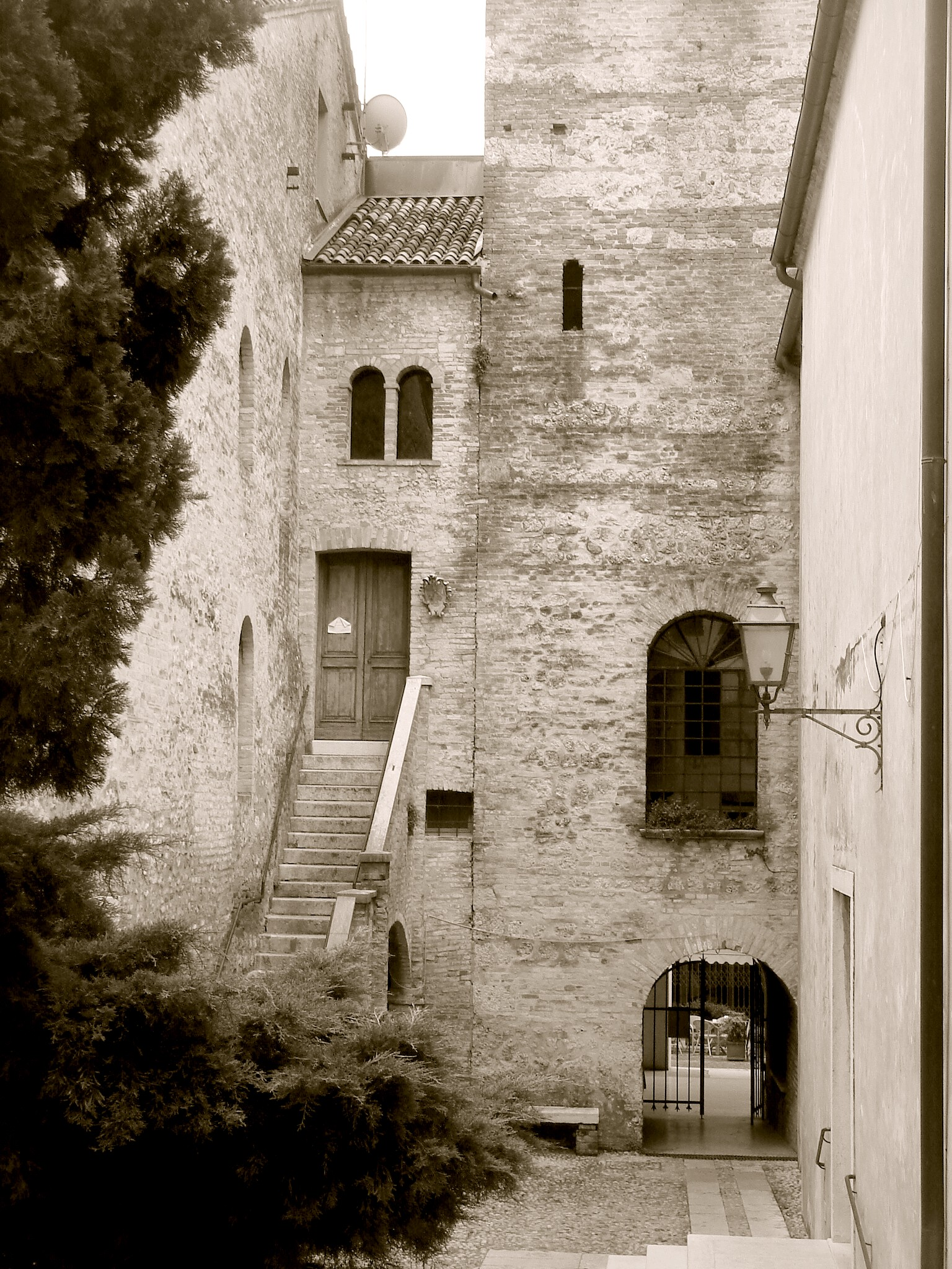 Conegliano: esterno del Duomo, scala di accesso alla Sala dei Battuti, Sottoportico alla base del Campanile e lato destro del Duomo con ingresso laterale.